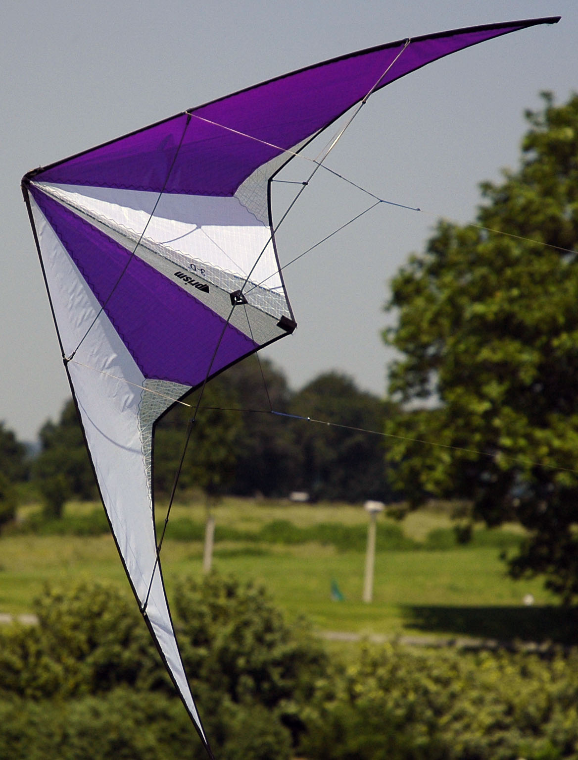 Prism 3D Auteur: Wilfried Kopp